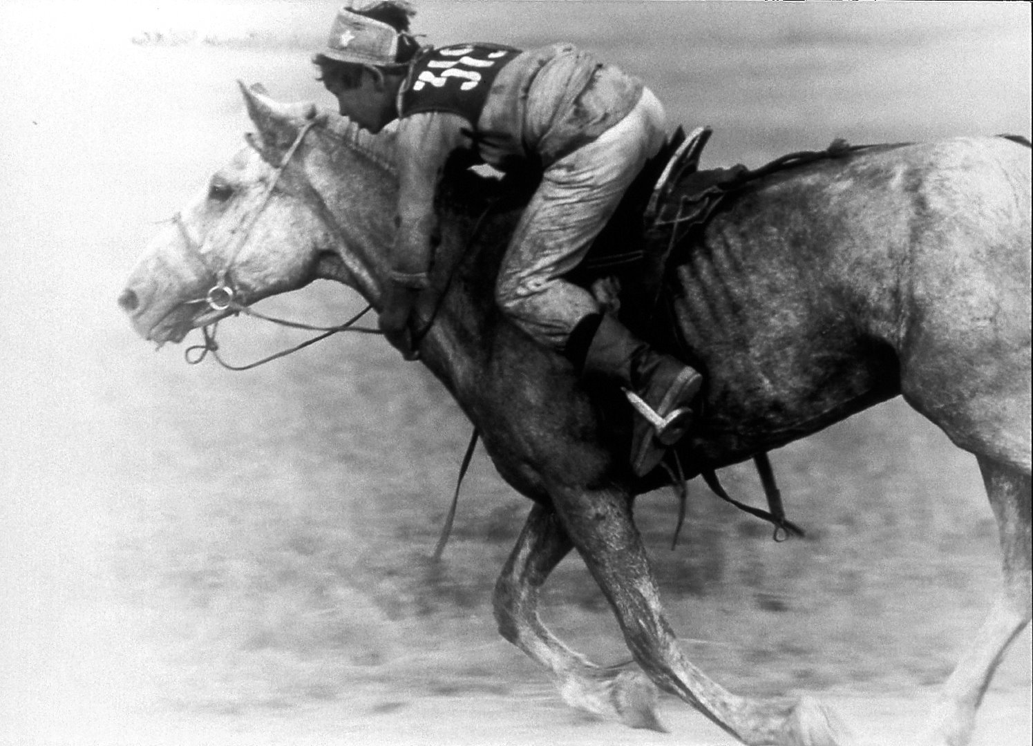 Mongolia, Naadam rider